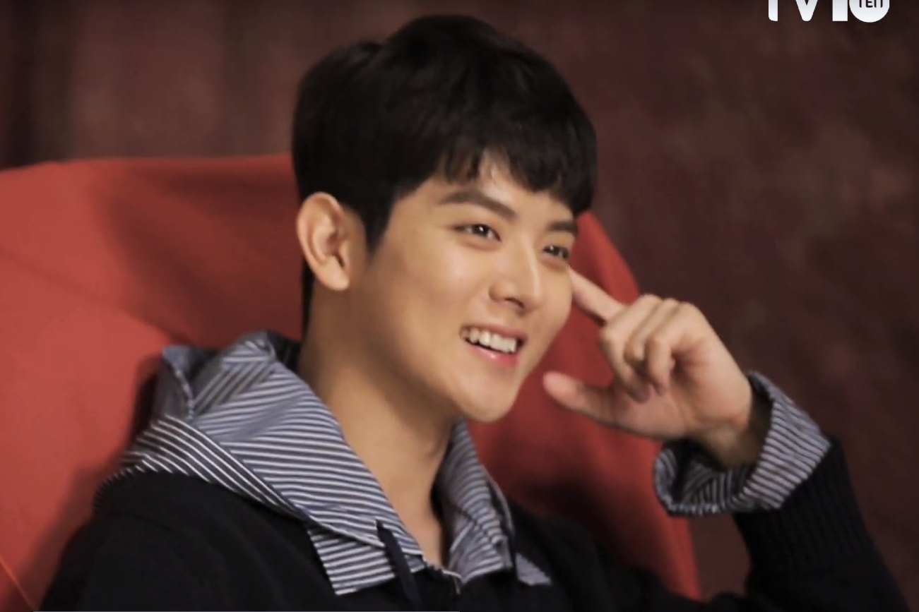 [TV텐] 텐스타 11월호 커버는 가을을 닮은 배우 여회현! 분위기가 폭발하는 여회현의 촬영 현장, 비하인드 영상을 통해 확인하세요!